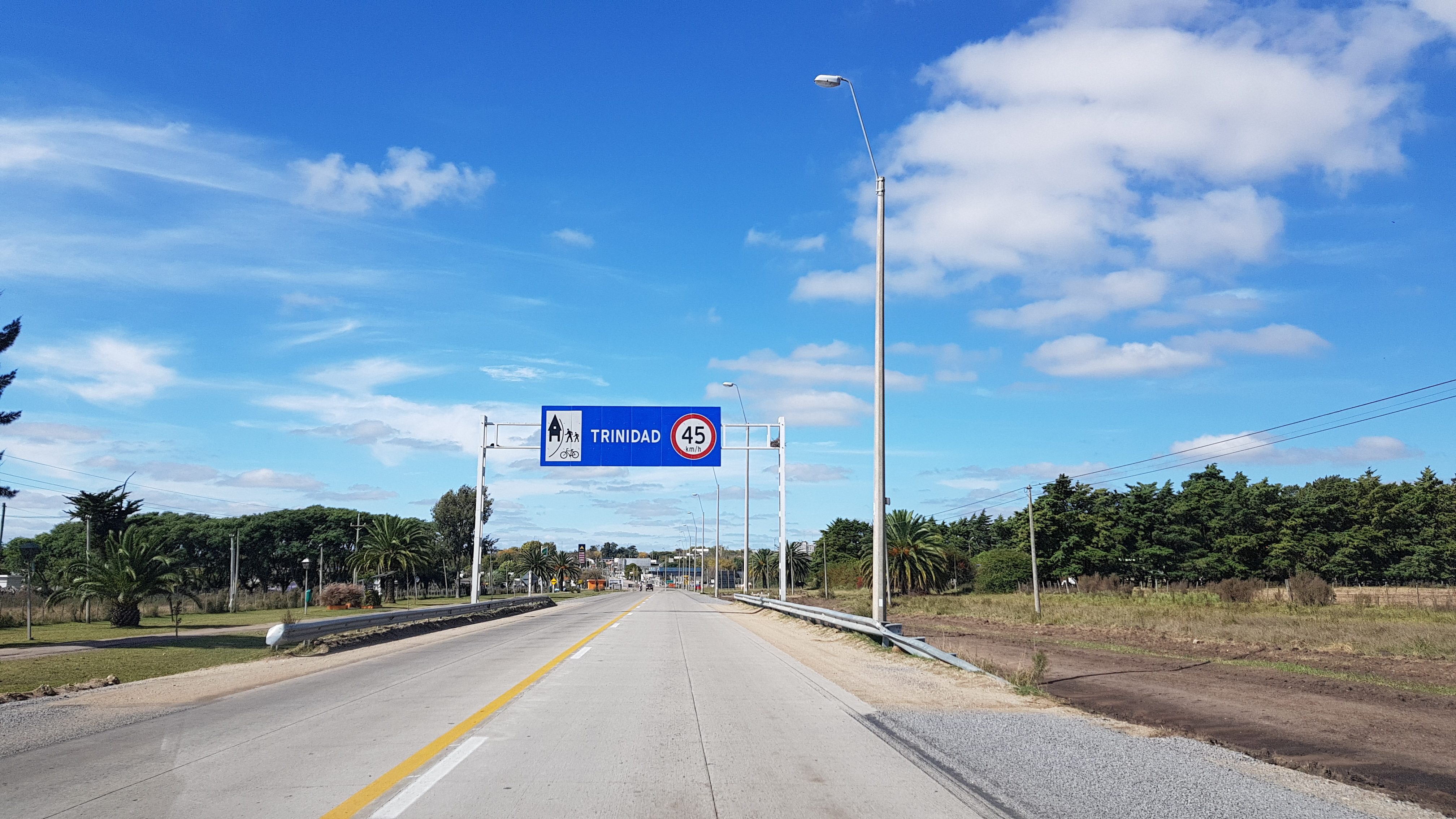 Acceso Noroeste a la ciudad de Trinidad por la ruta 3 en el departamento de Flores, Uruguay.